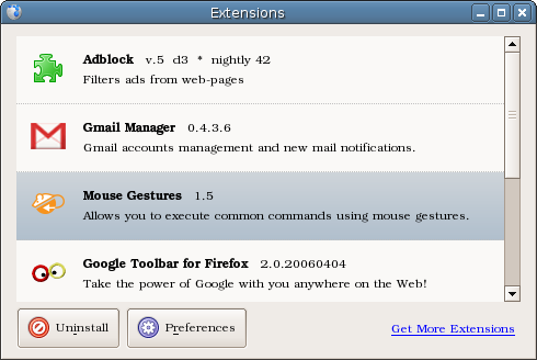 Menadżer rozszerzeń w przeglądarce Flock